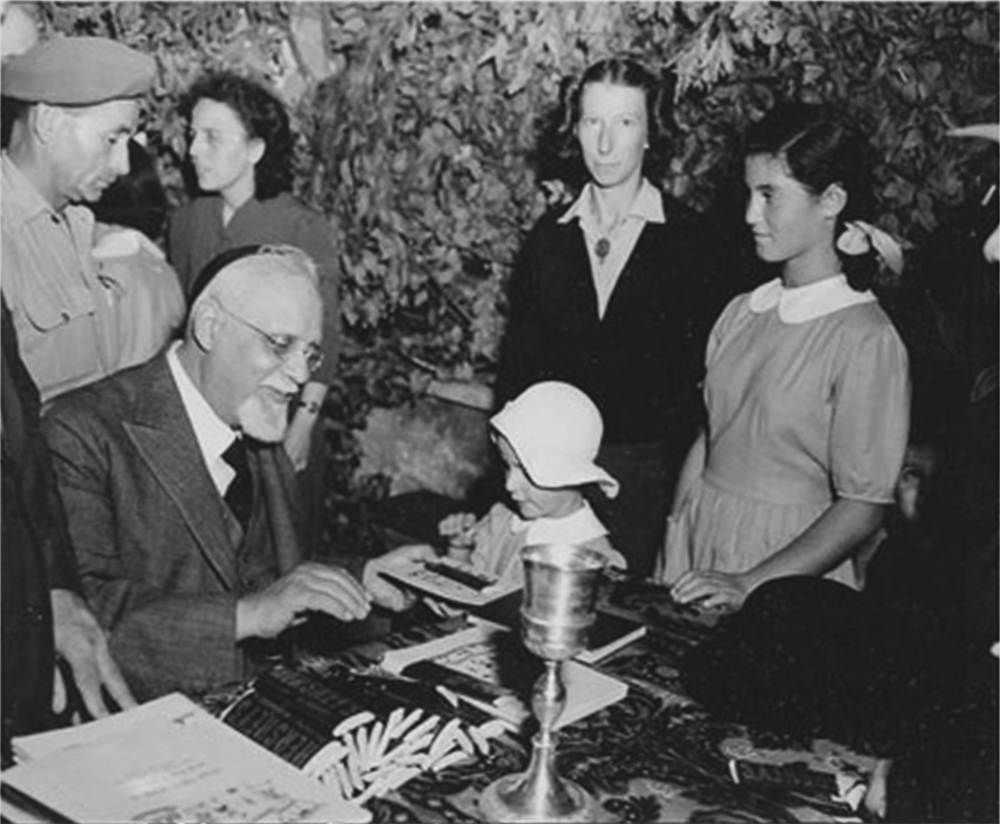 הרב דוד פראטו, רבה הראשי של רומא מחלק שוקולד ליתומות במהלך טקס בבית היתומים היהודי ברומא, 1945.